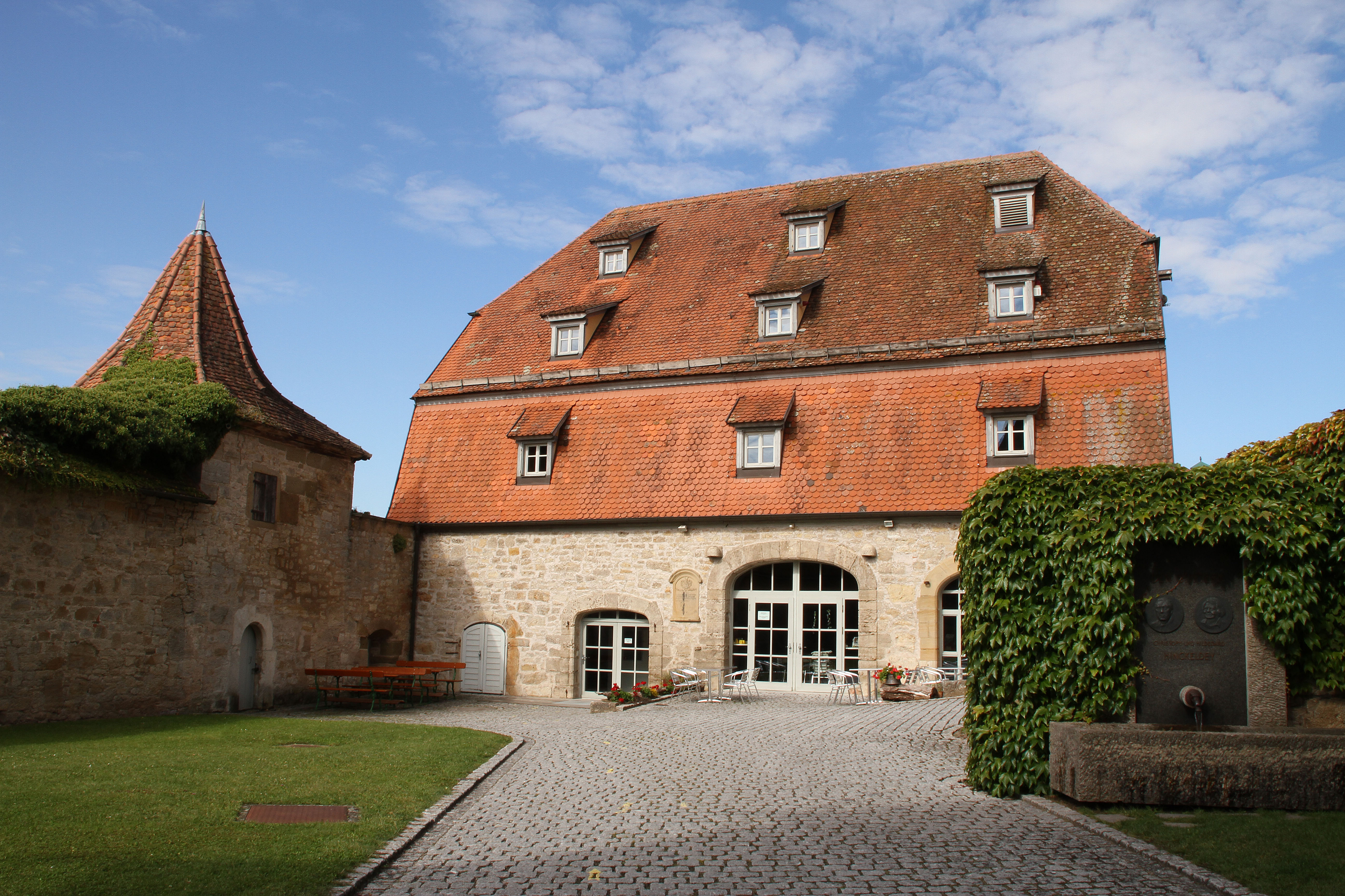 Johanniterscheune Außenansicht